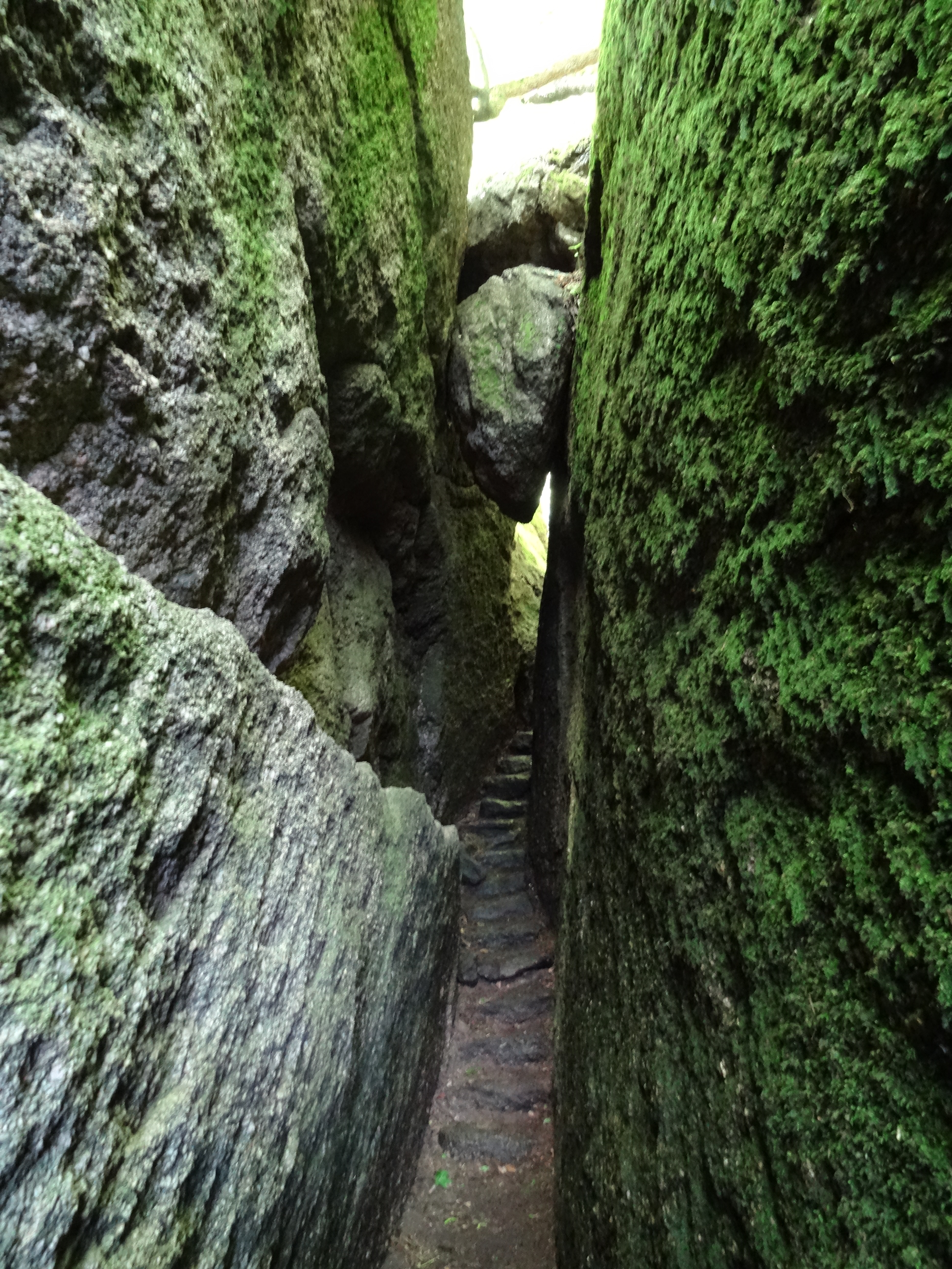 Felsdurchgang im Naturpark Burg Falkenstein